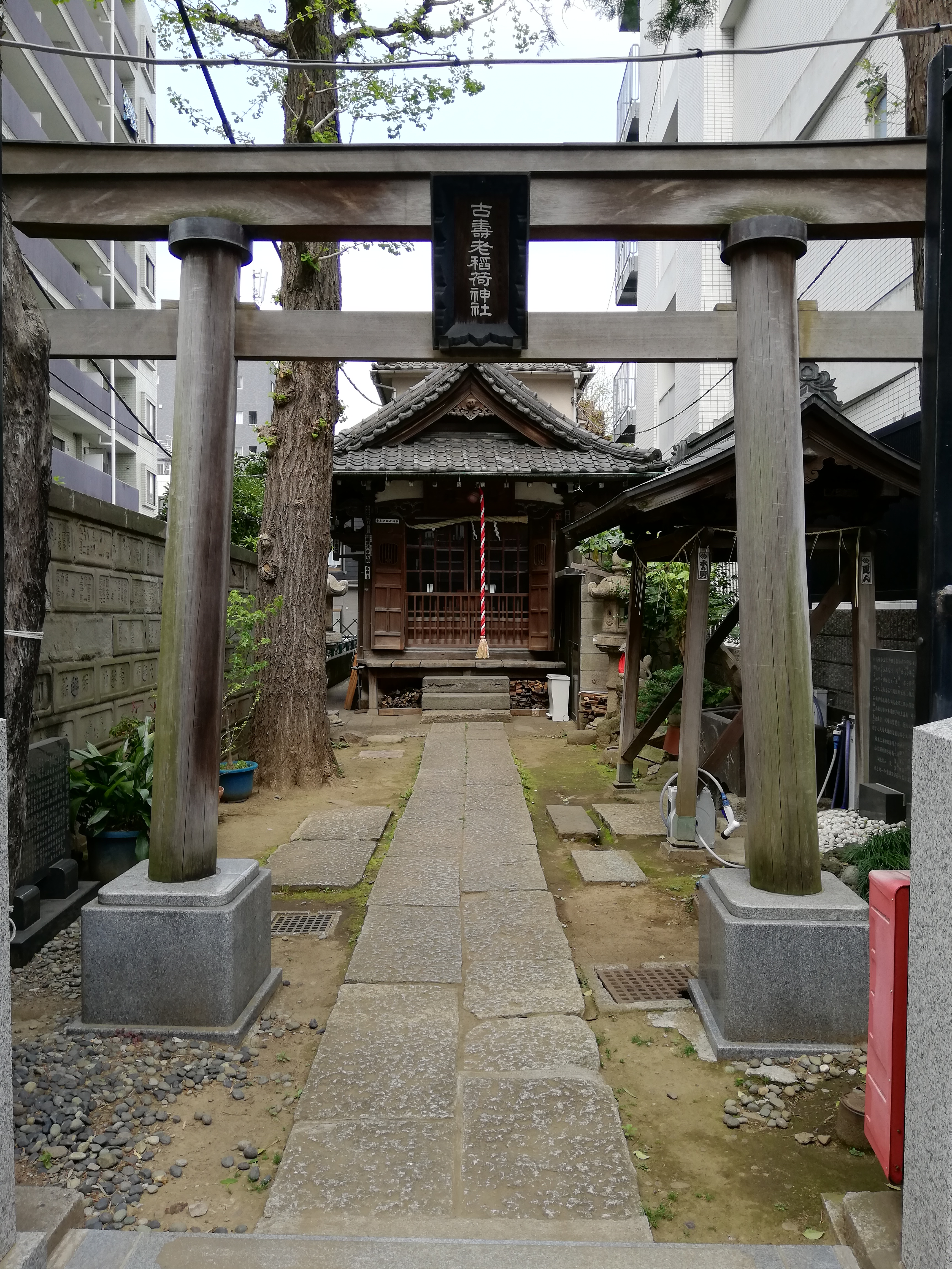 古寿老稲荷神社の鳥居と社殿